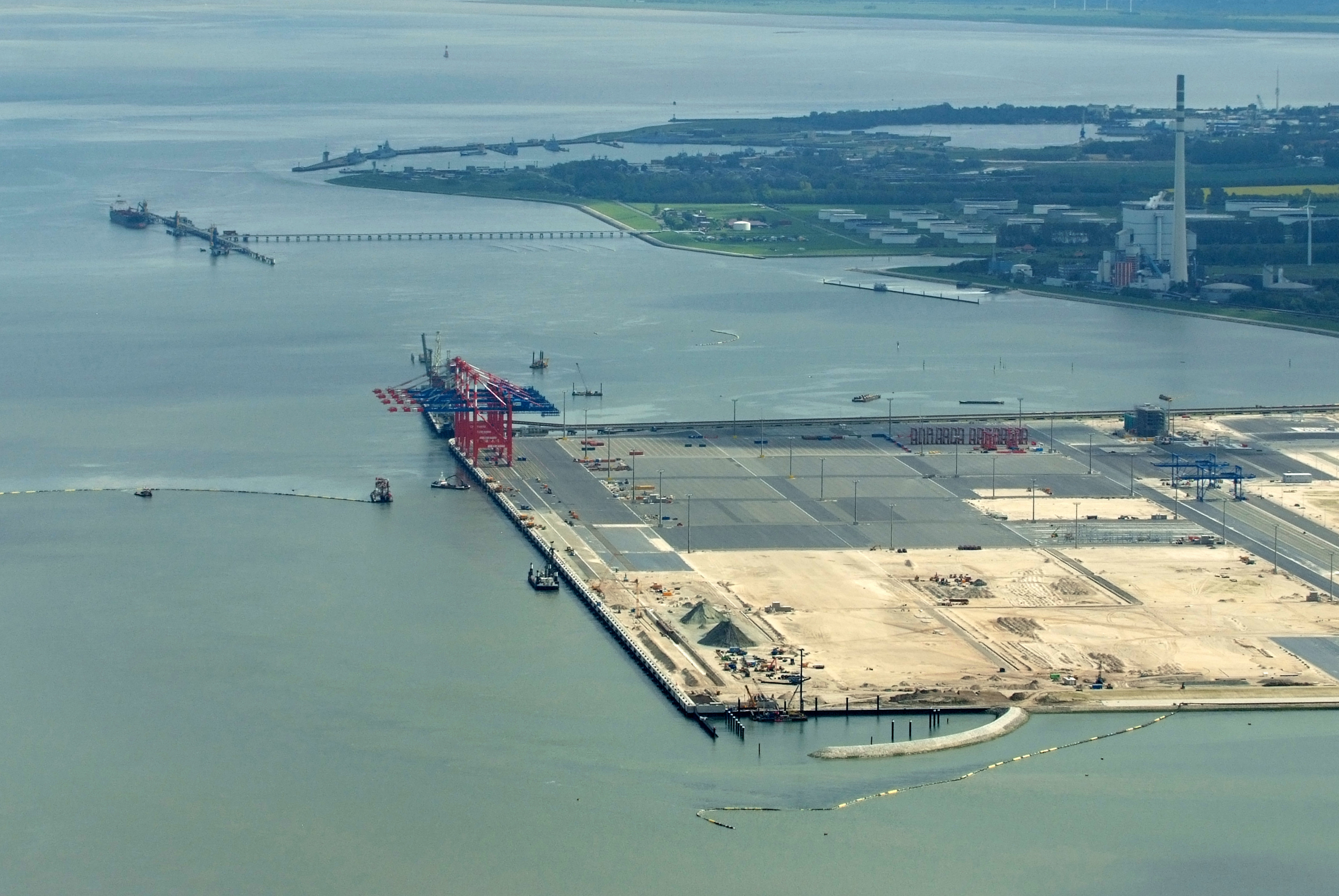 JadeWeserPort Fotoflug vom Flugplatz Nordholz-Spieka über Bremerhaven, Wilhelmshaven und die Ostfriesischen Inseln bis Borkum